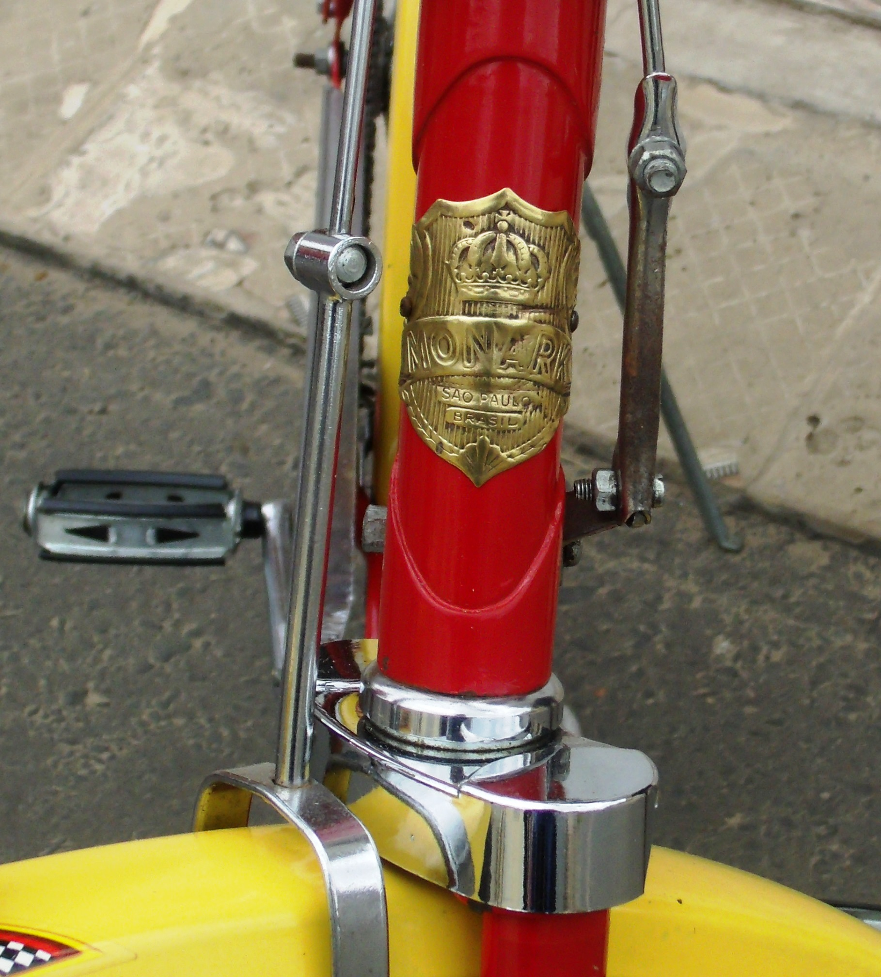 Parte timbral de uma bicicleta monark anos 50 e 60.